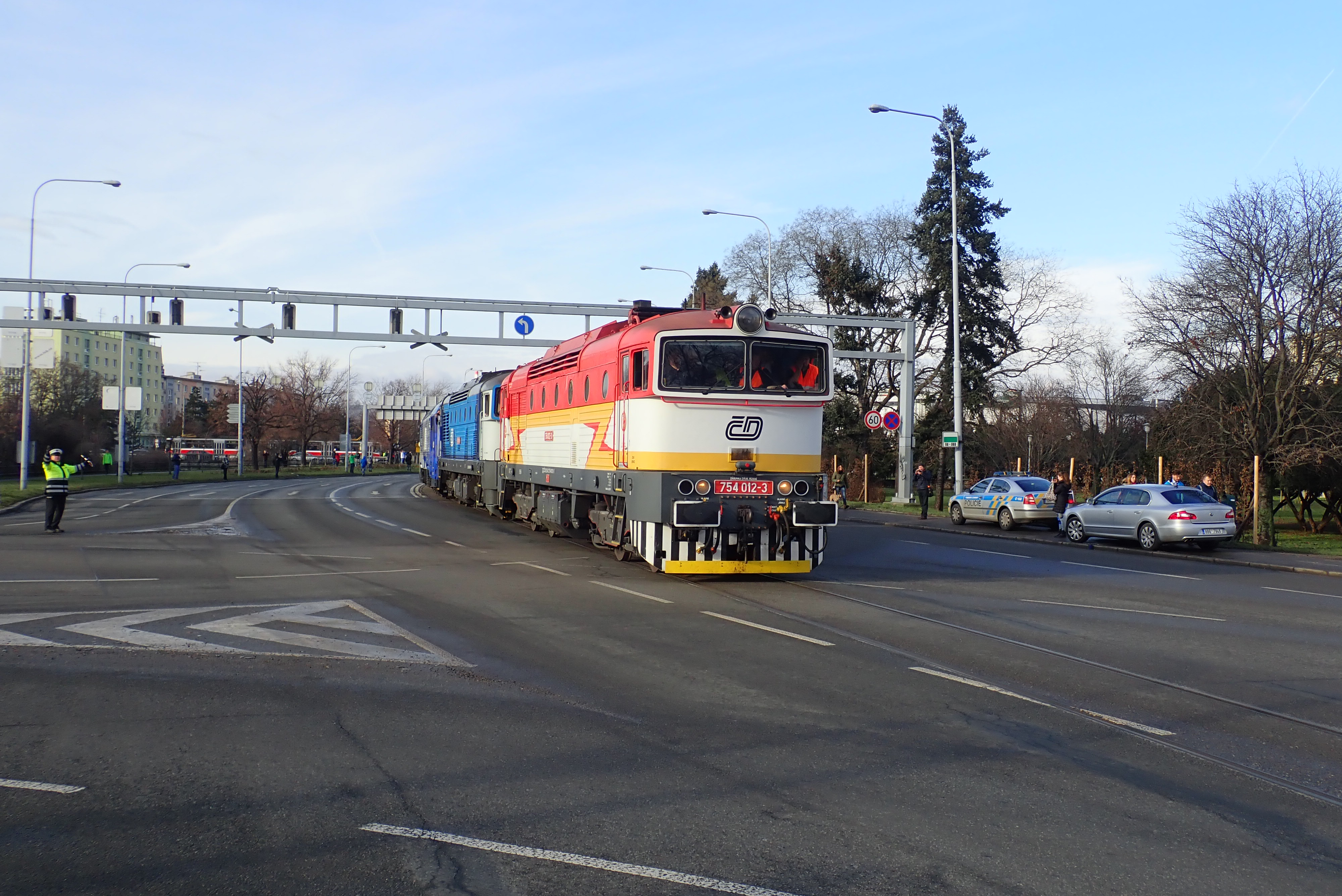 Kometa expres na ulici Poříčí při jízdě zpět na dolní nádraží